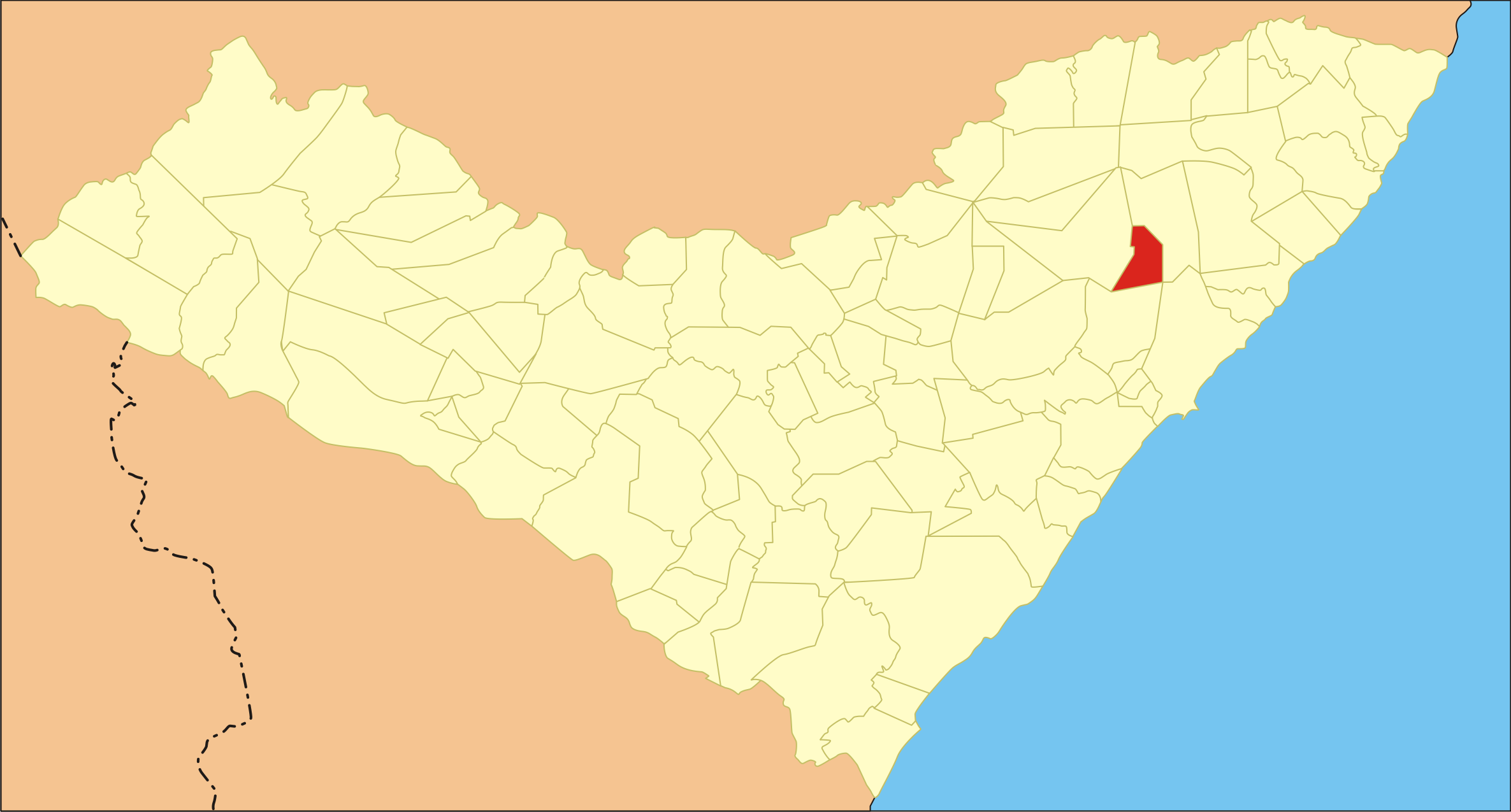 Localização da cidade no estado de Alagoas.